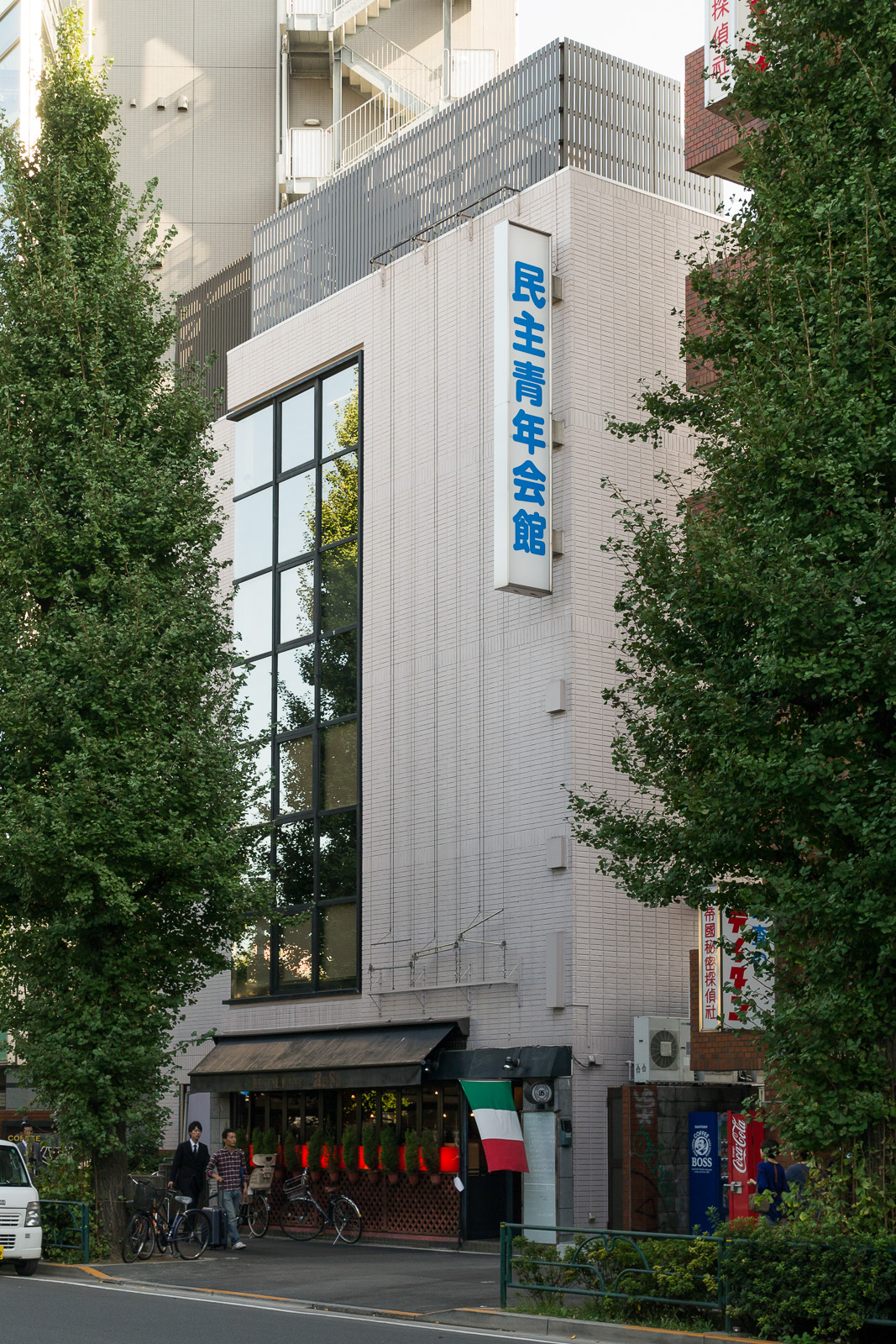 民主青年会館（日本民主青年同盟本部）、東京都渋谷区千駄ヶ谷。